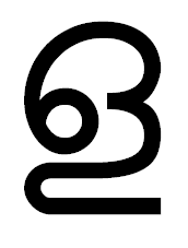 лахарам мурдханьям